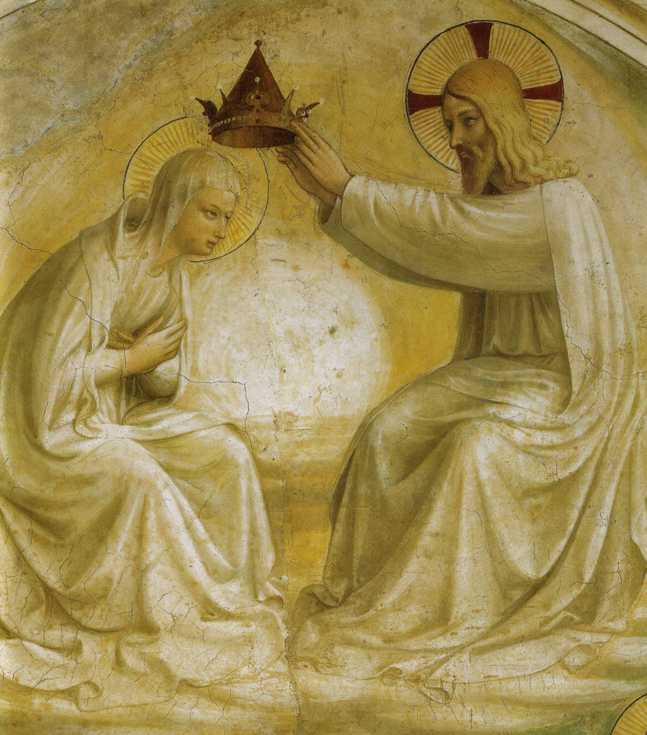 see filename. fresco restored